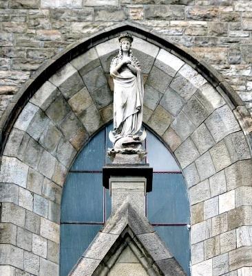 Imagen de la Virgen María que se encuentra en la entrada de la Catedral de Bariloche.